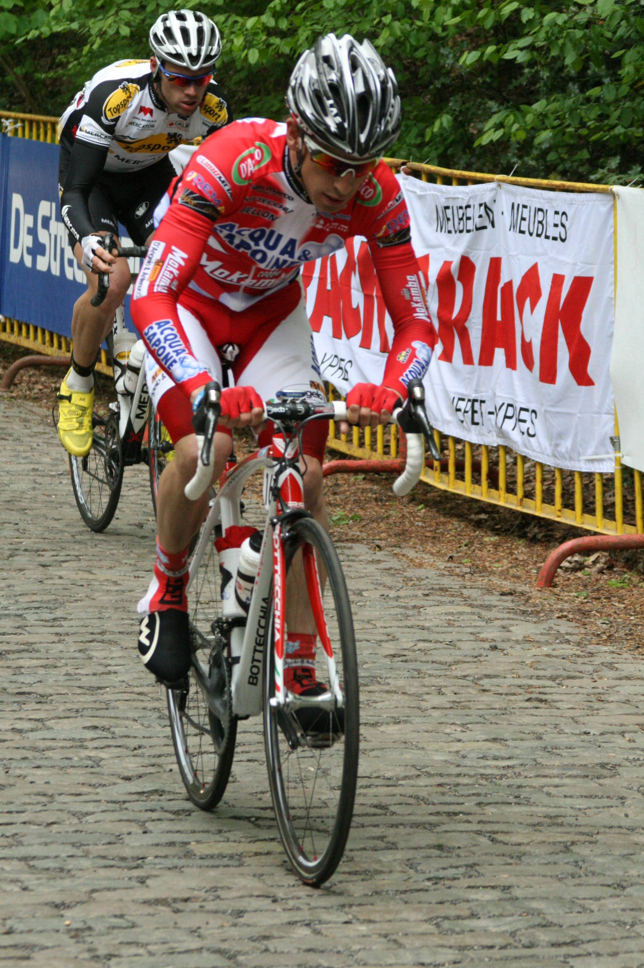 Stijn Neirynck et Reinier Honig, échappés lors de la 3e étape des 4 jours de Dunkerque 2010, sur le mont Kemmel